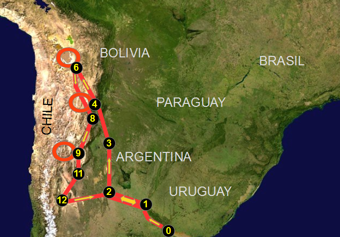 Mapa ruta del Dakar 2016.